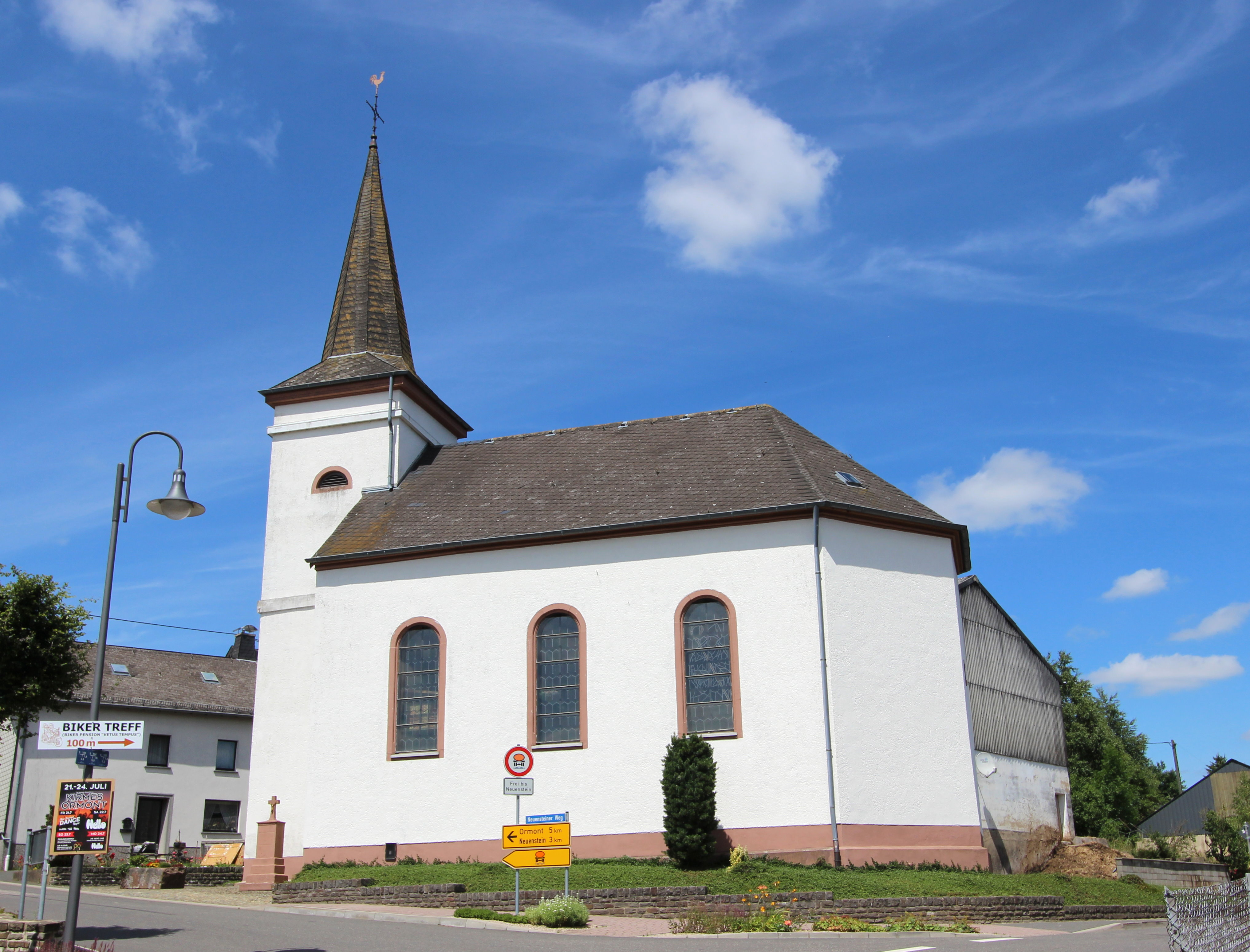 54597 Neuendorf, Neuensteinerweg 2. Katholische Filialkirche von 1857/1858. Aufnahme von 2017.